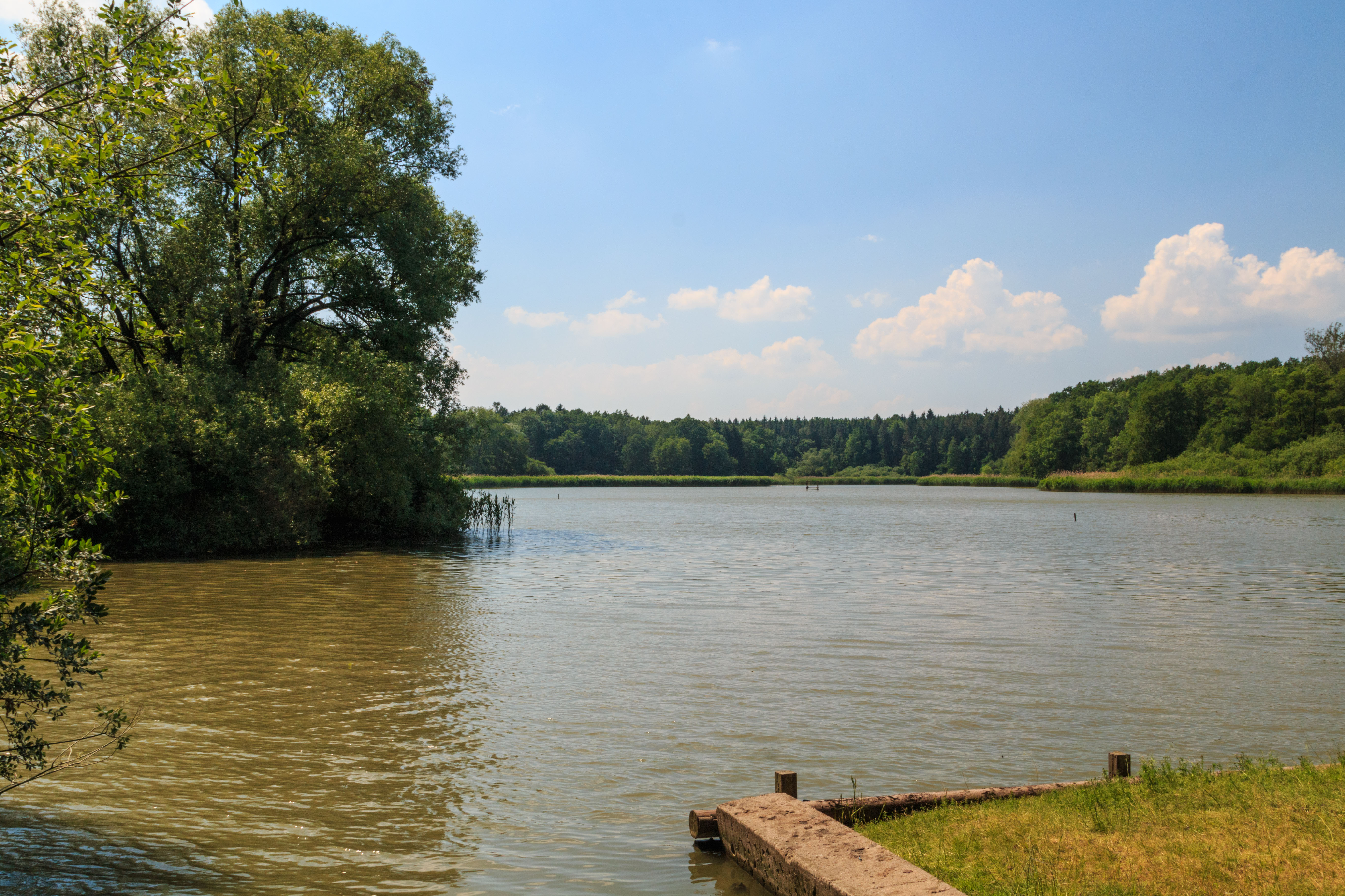 Podchlumský rybník Project: Fotíme Česko